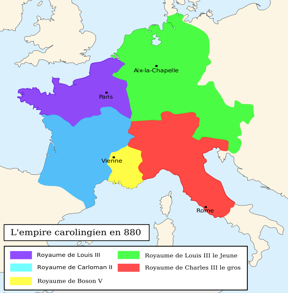 Correction de la faute d'orthographe commise sur : "Vienne"